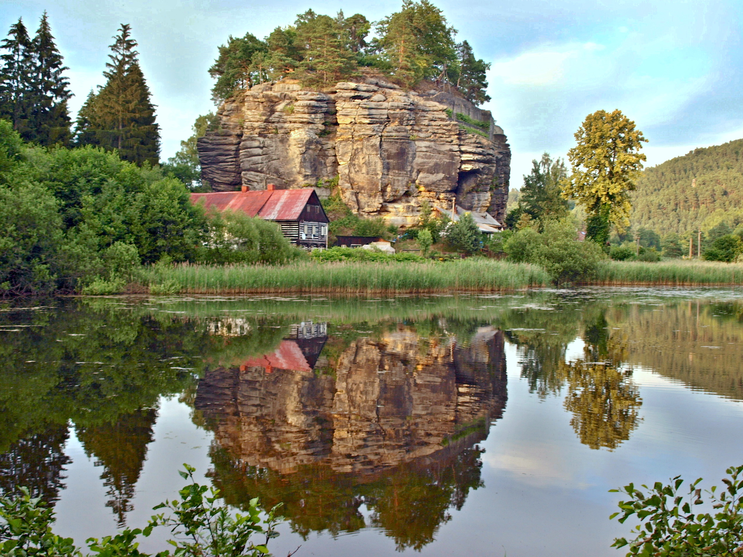 Sloup, skalní hrad